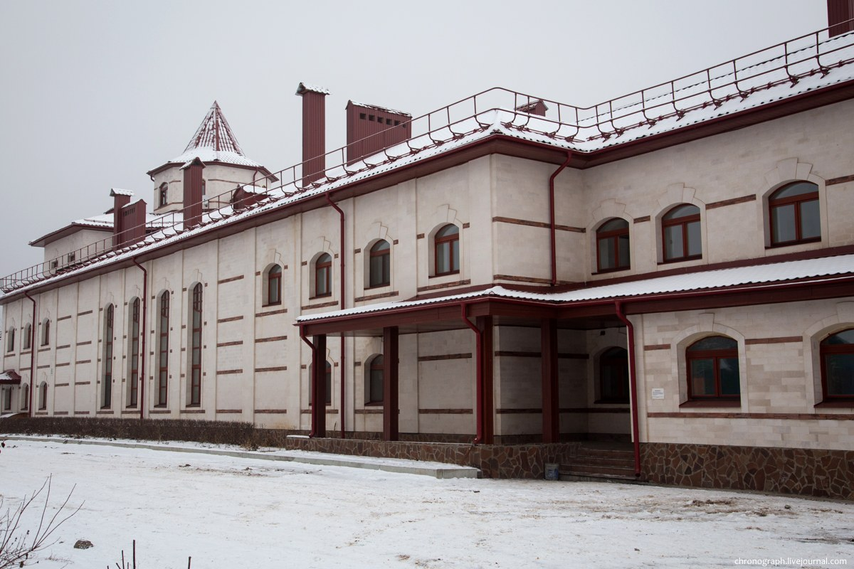 Внешняя сторона. Свято-Богородицкий Казанский мужской монастырь. Винновка, Ставропольский район Самарской области